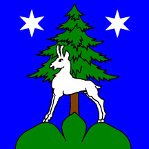 Escudo de la comuna suiza de Mase, ubicada en el cantón del Valais.